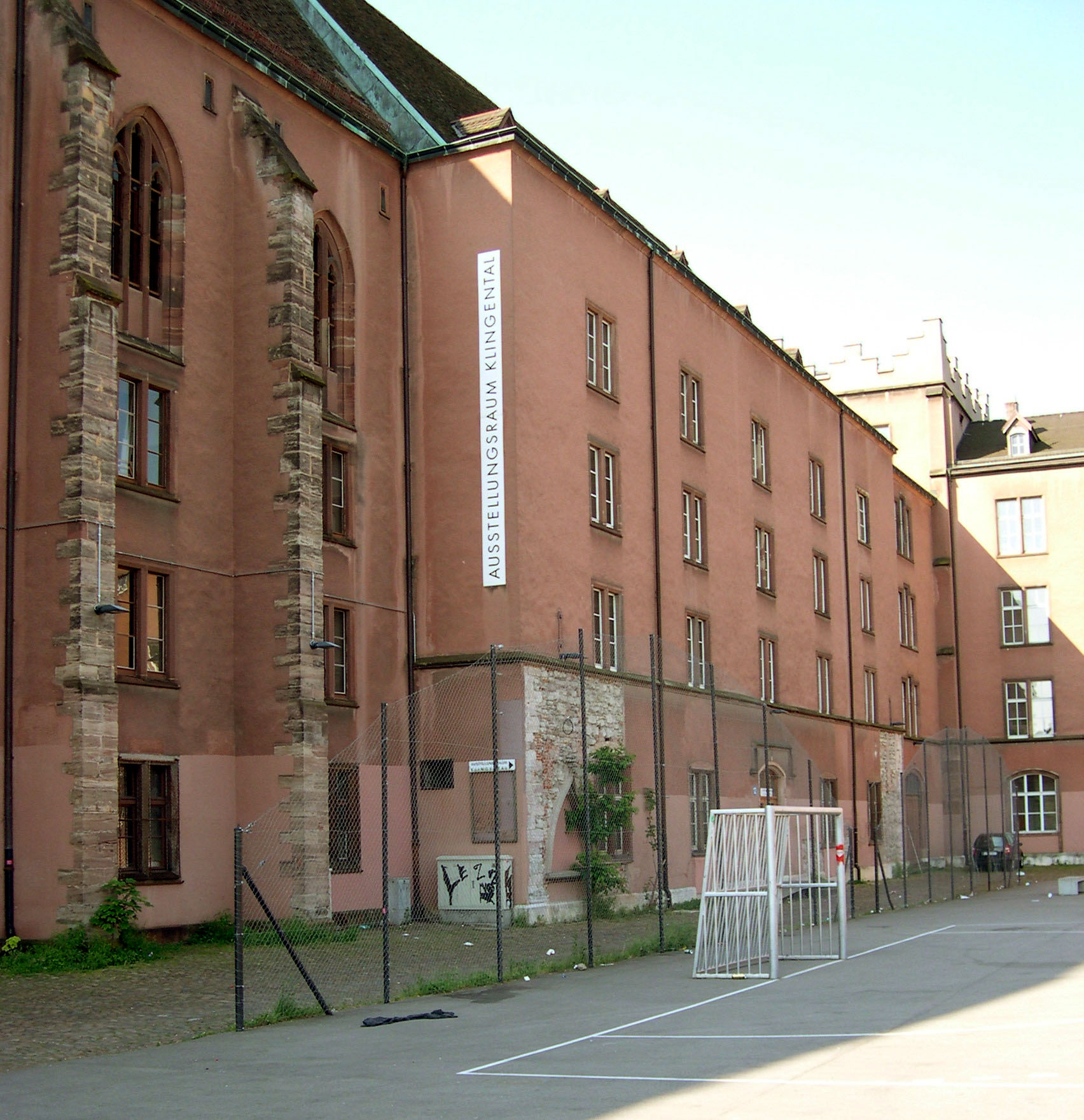 Ausstellungsraum Klingental auf dem Kasernengelände in Basel.